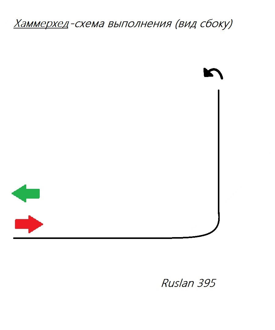 Хаммерхед- схема выполнения,вид сбоку. Из схемы видно,что перед разворотом на 180°,в отличии от Ранверсмана следует вертикальный подъём(Свечка)-под прямым углом.